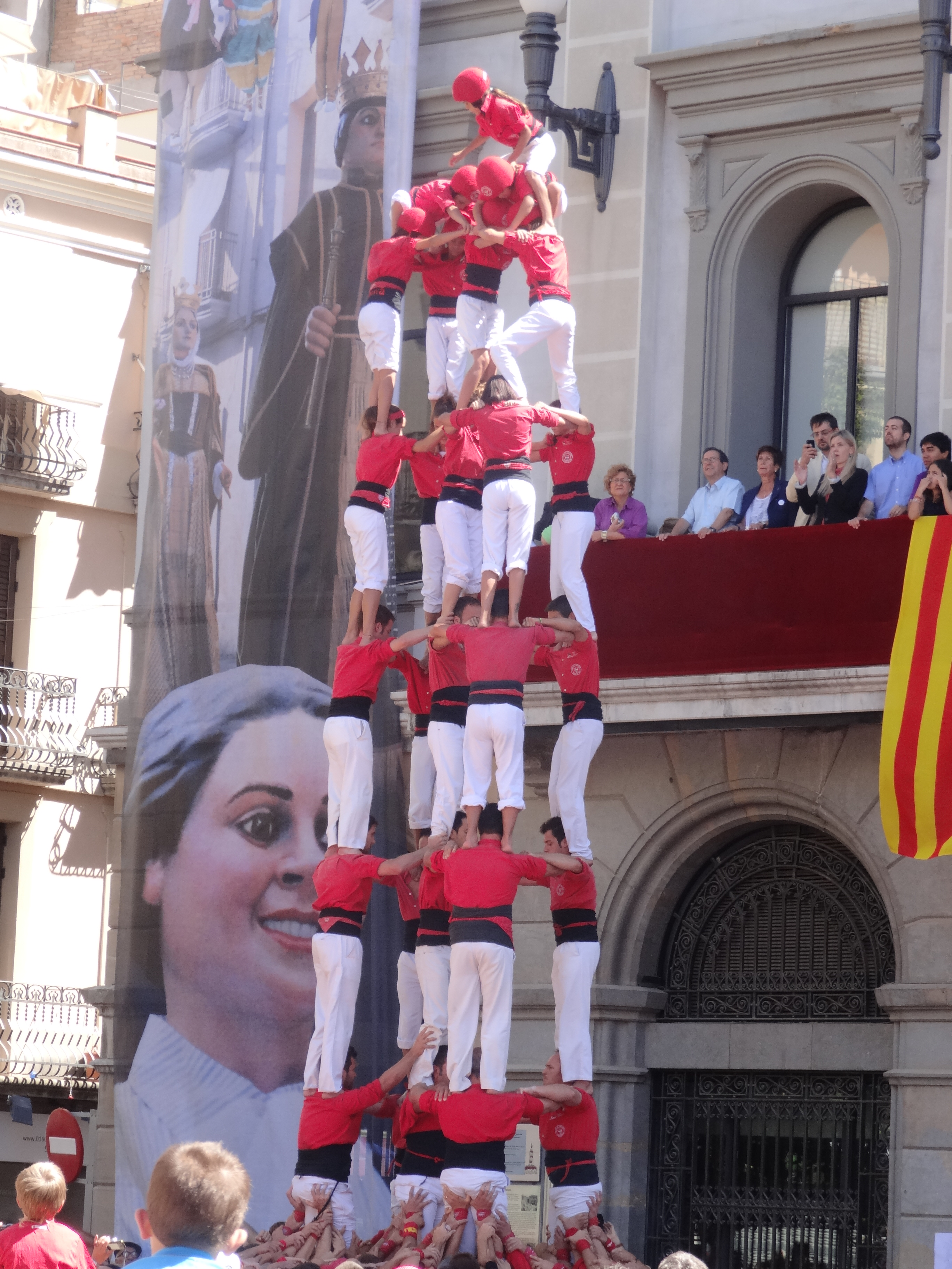 Actuació castellera de la Festa Major Major d'Igualada 2013, a la plaça de l'ajuntament. Colla Joves de Valls 5de8 descarregat